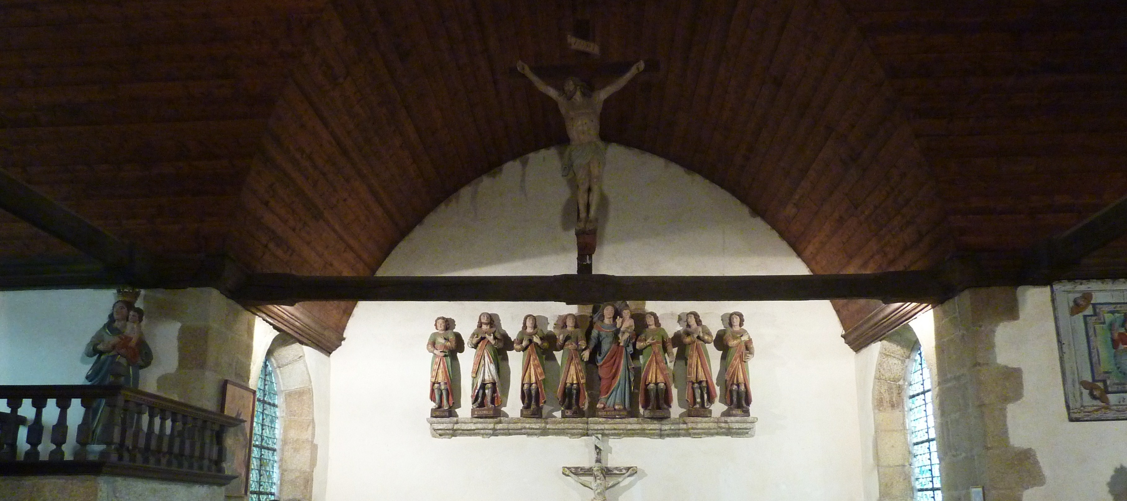 Sept-Saints (Vieux-Marché) : le choeur de la chapelle et les sept saints